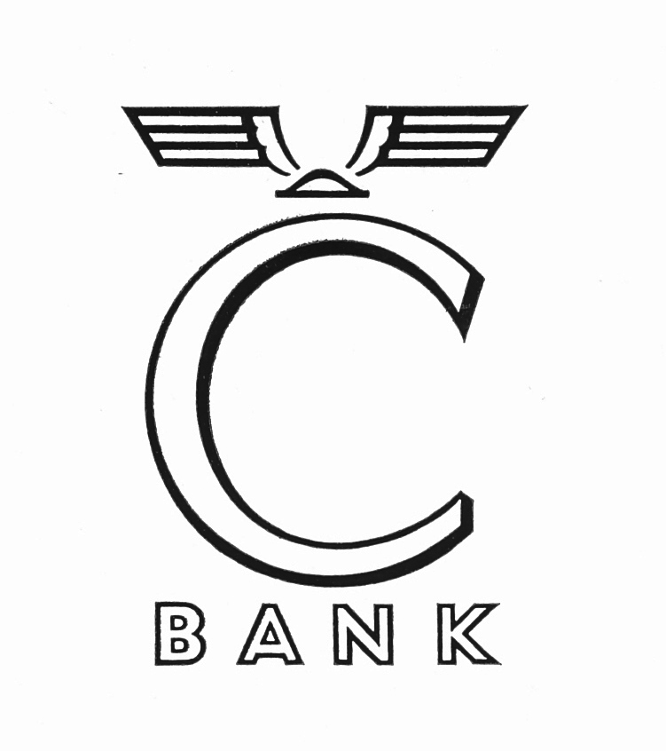 Logo mit Hermesflügeln der Commerzbank von 1958-1972.